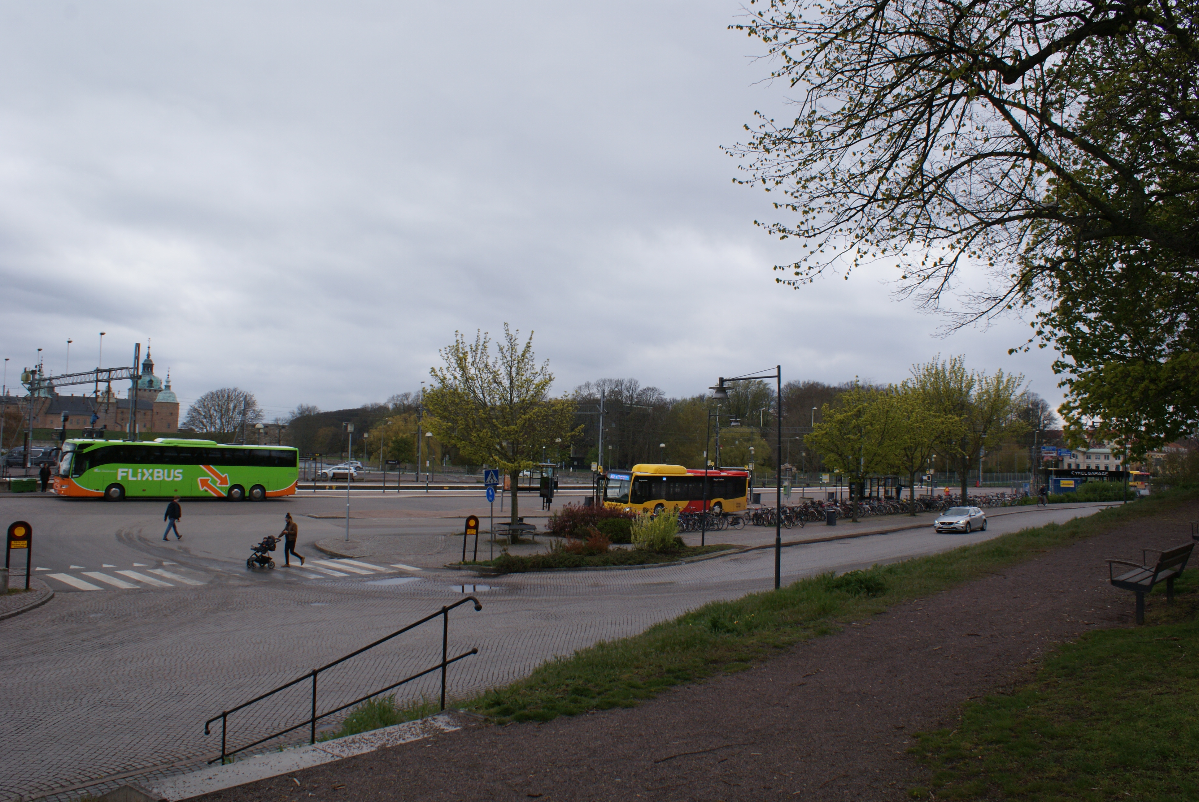 Bussterminalen på Kalmar Central